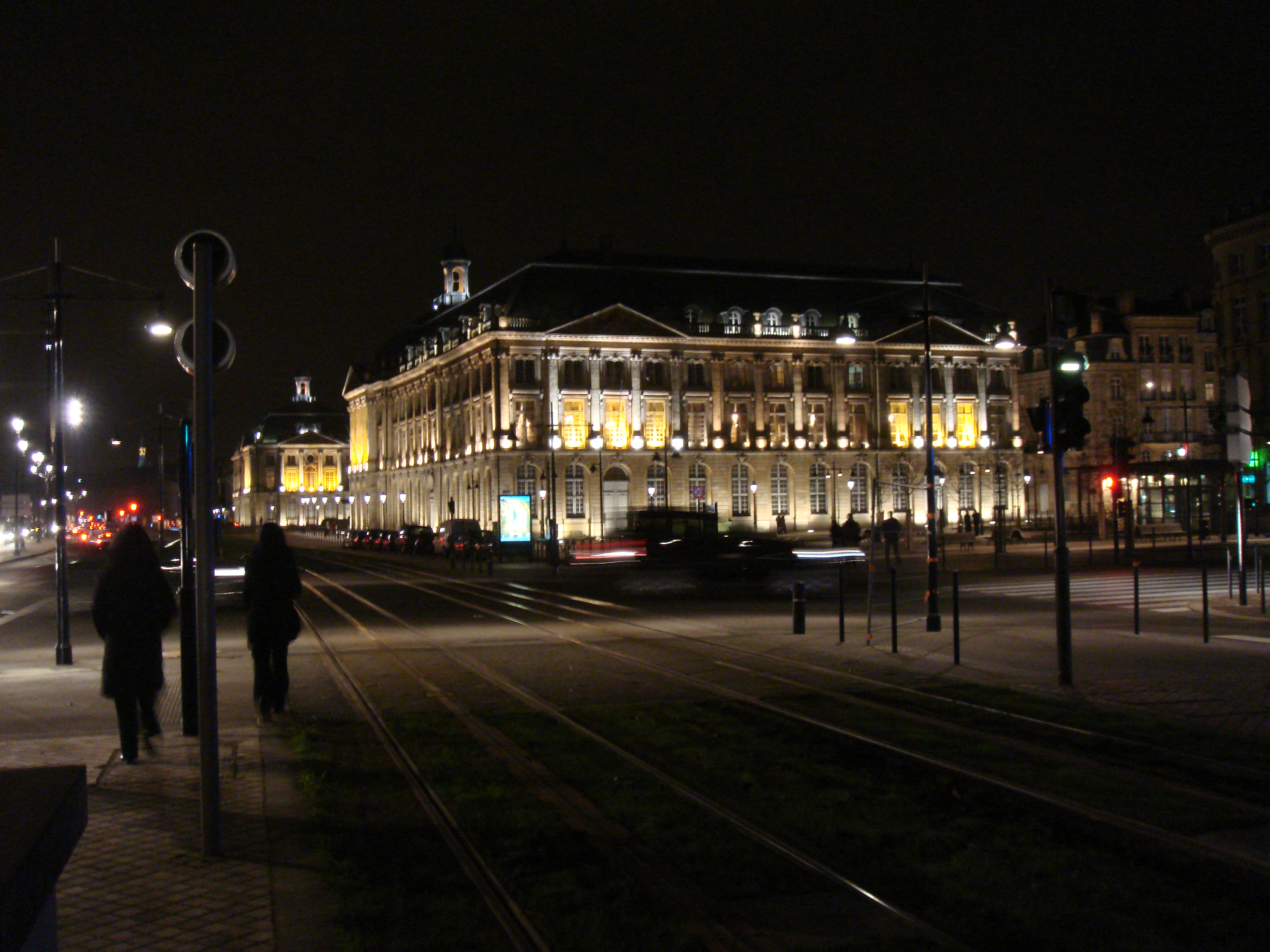 Bordeaux, Place de la Bourse vue de nuit.